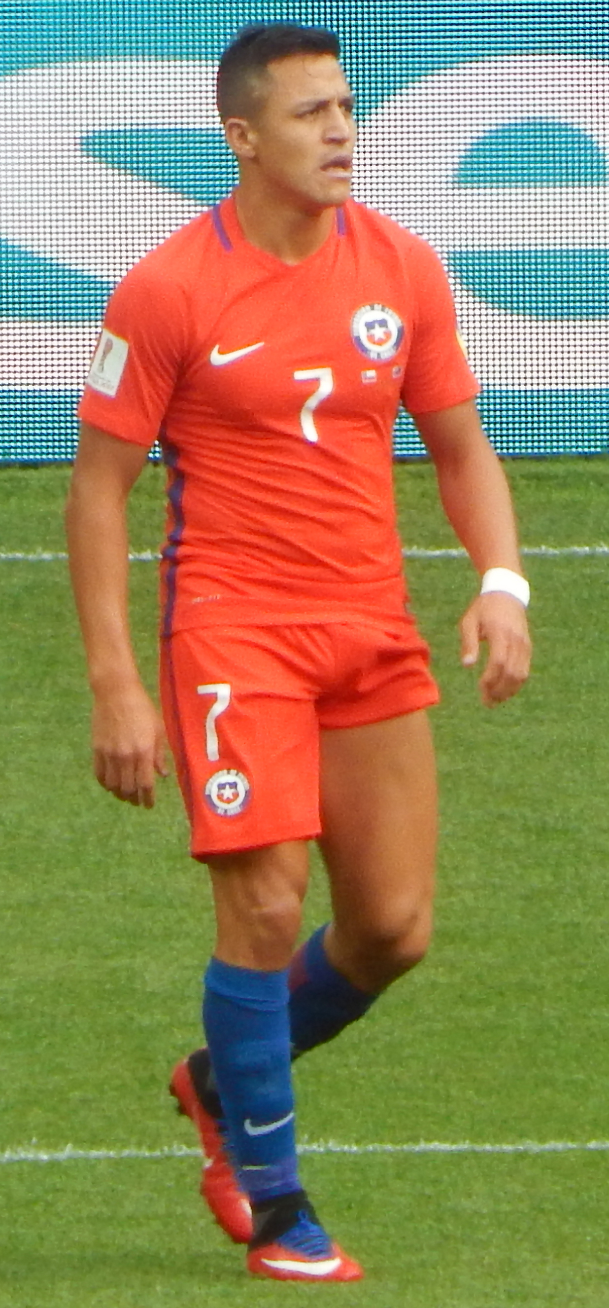 Алексис Санчес Матч Чили – Австралия